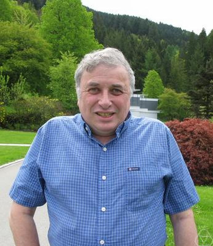 Andrei Zelevinsky, Oberwolfach 2010